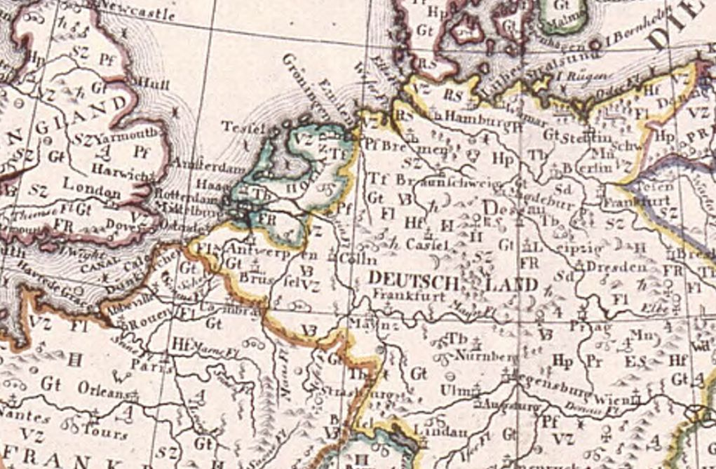 Neue Carte von Europa, 1782 (detail)